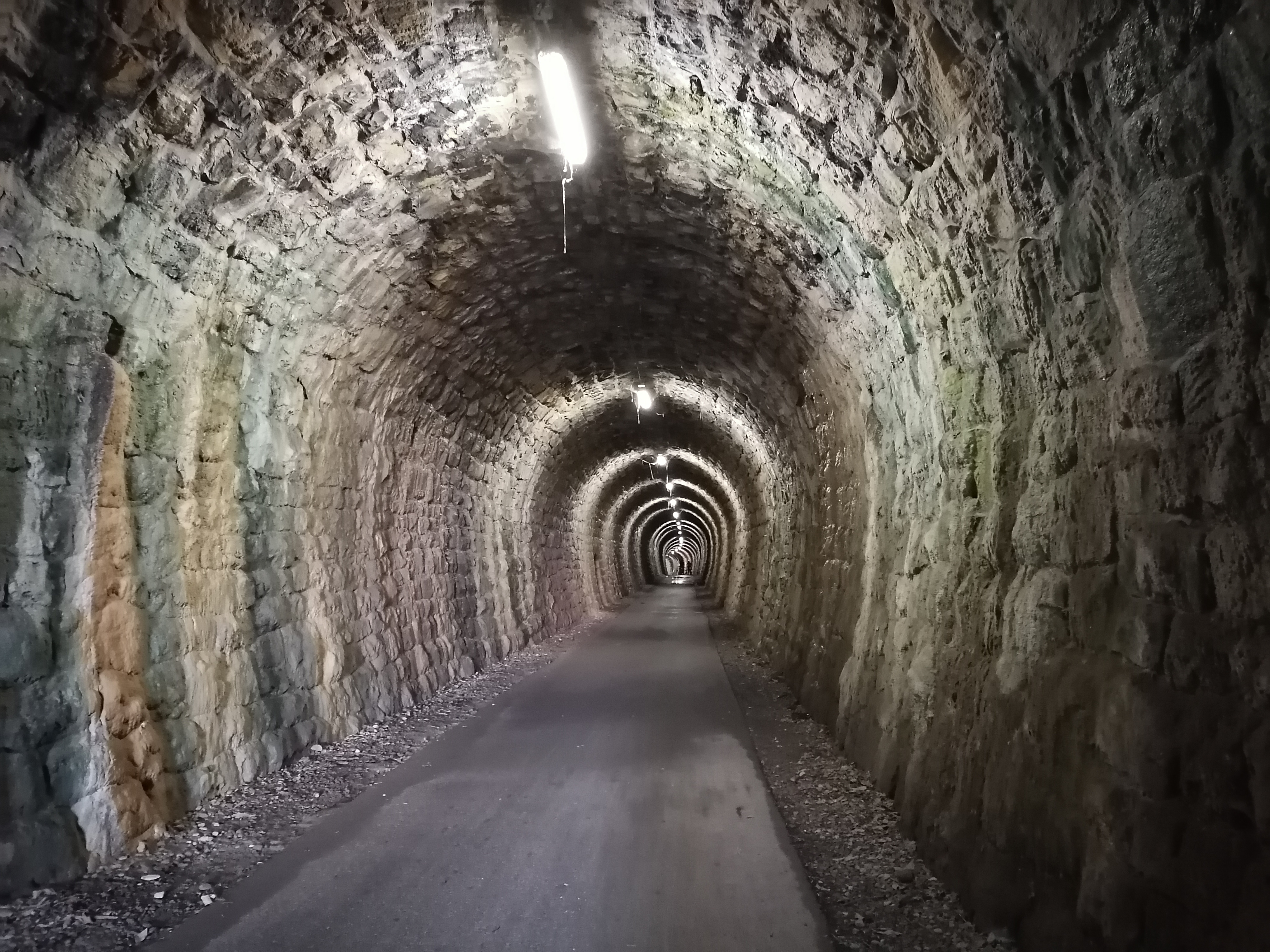 Notranjost 214 m dolgega predora Šalet